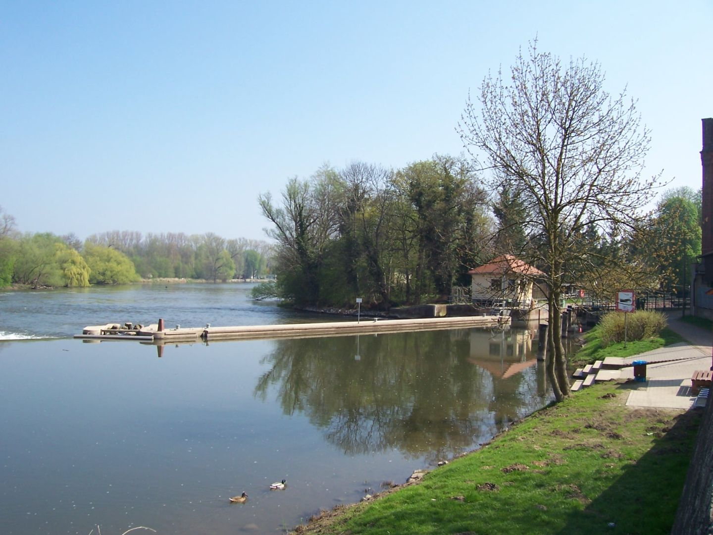 Saaleschleuse in Weißenfels